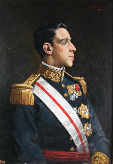 Retrato del rey Alfonso XIII de España (1886-1931), vestido con uniforme de gala de capitán general y portando la banda de la Orden de San Hermenegildo. Se conserva en el Museo de Huesca.